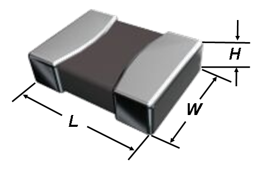 MLCC-Abmessungen